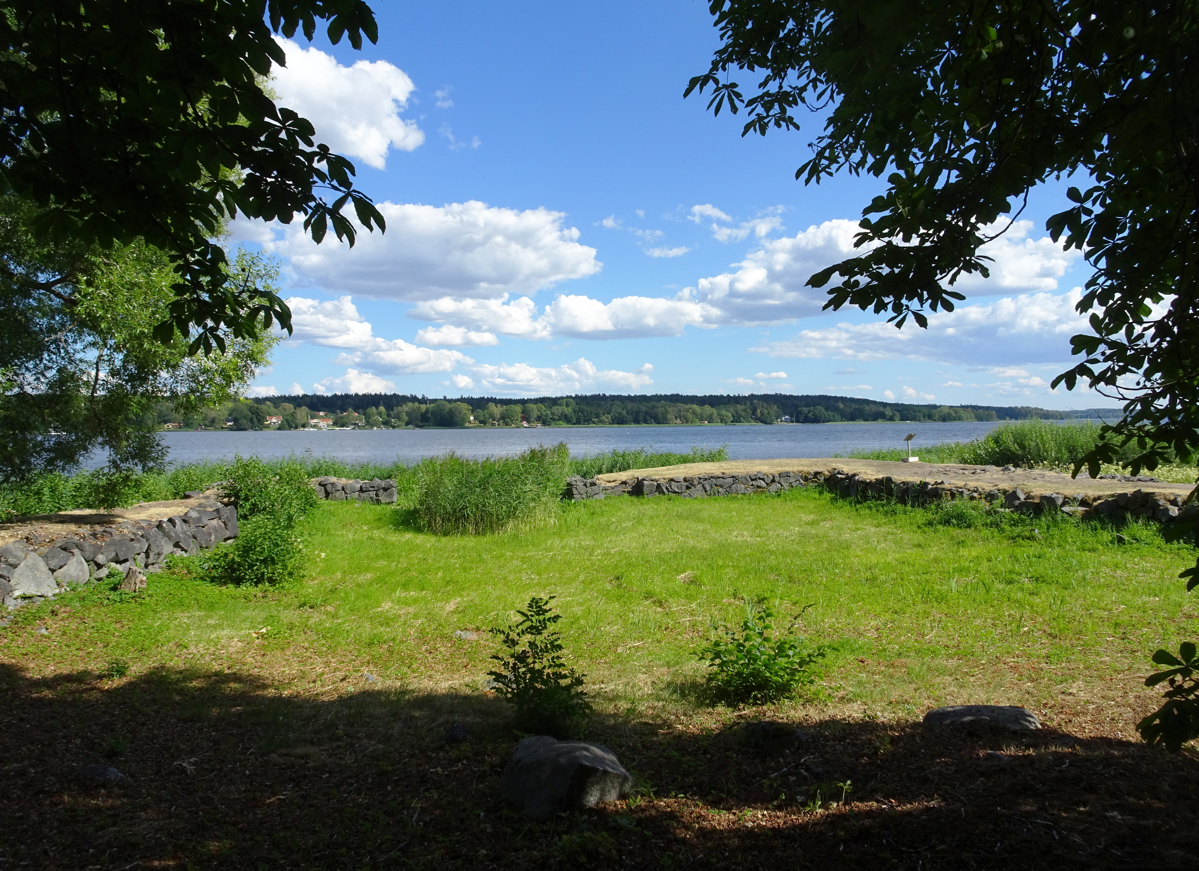 Skokloster slott, den gamla hamnbassängen